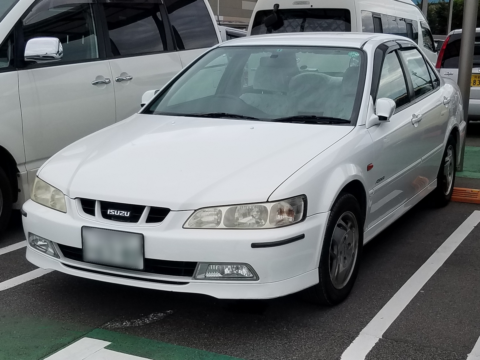 アスカ LJ(後期型）